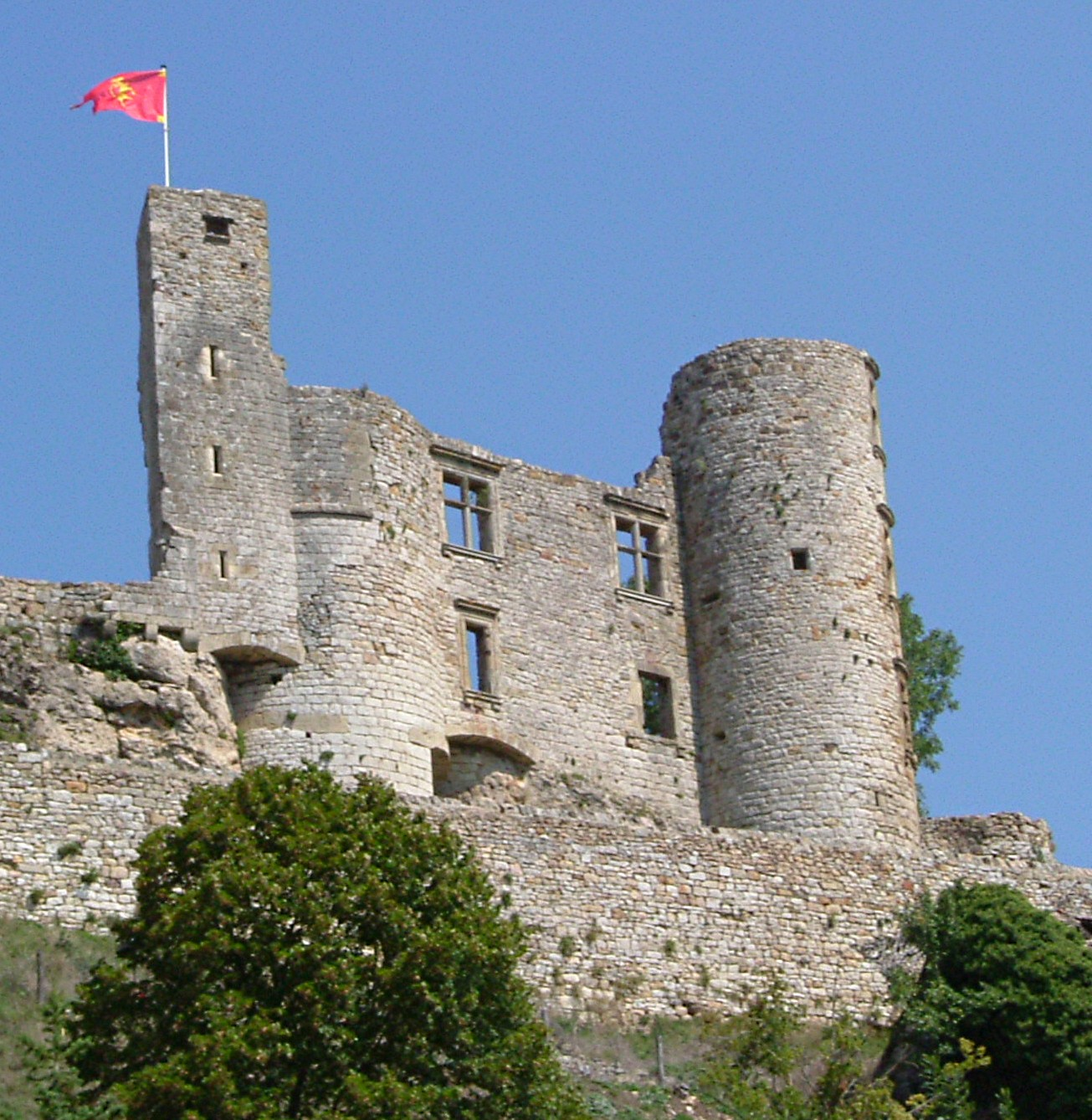 Chateau de Bertholène.